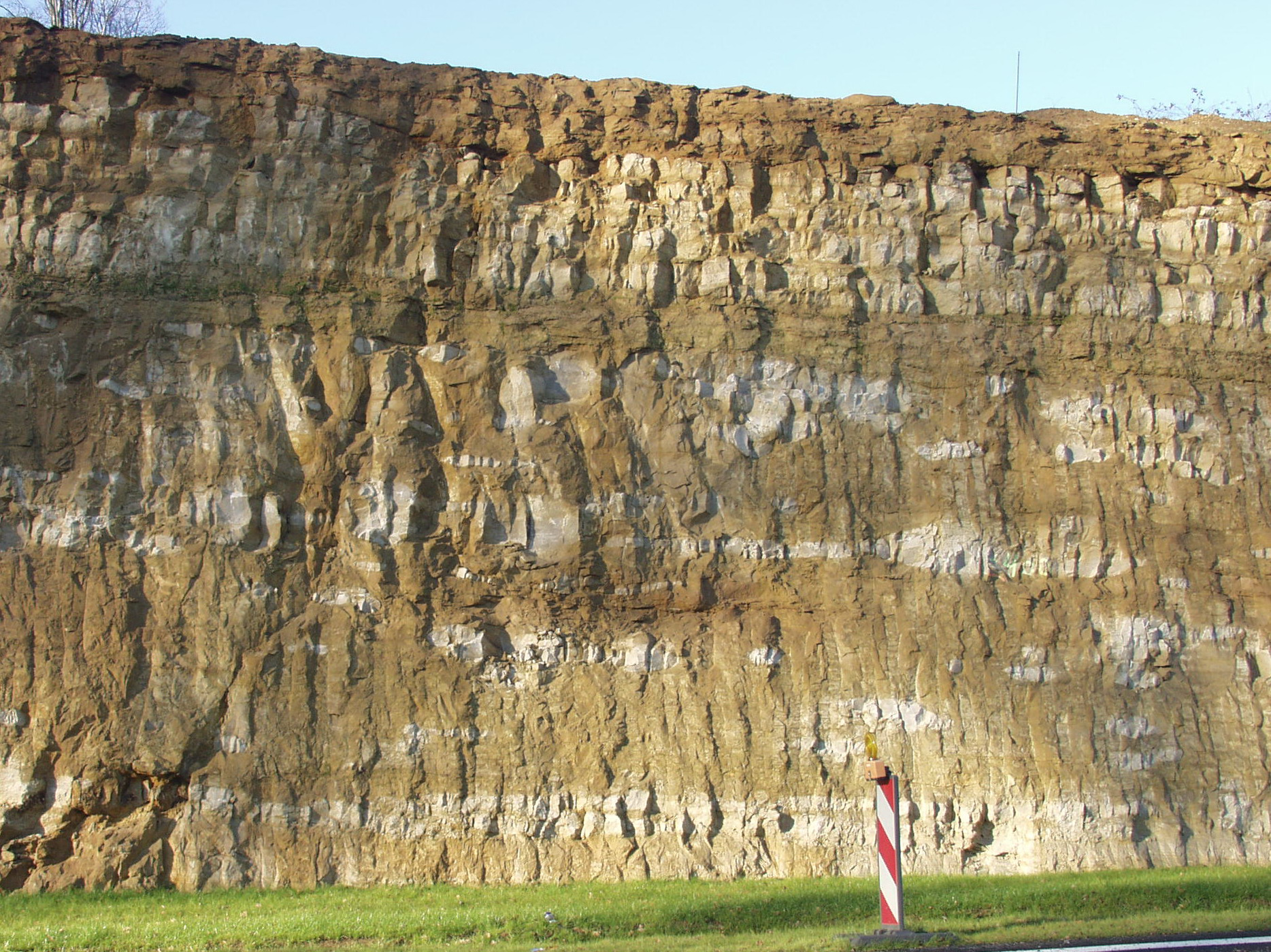 Grès de Luxembourg, affleurement frais sur le chantier routier "Route du Nord", à Waldhaff (10 km au nord de Luxembourg-Ville)